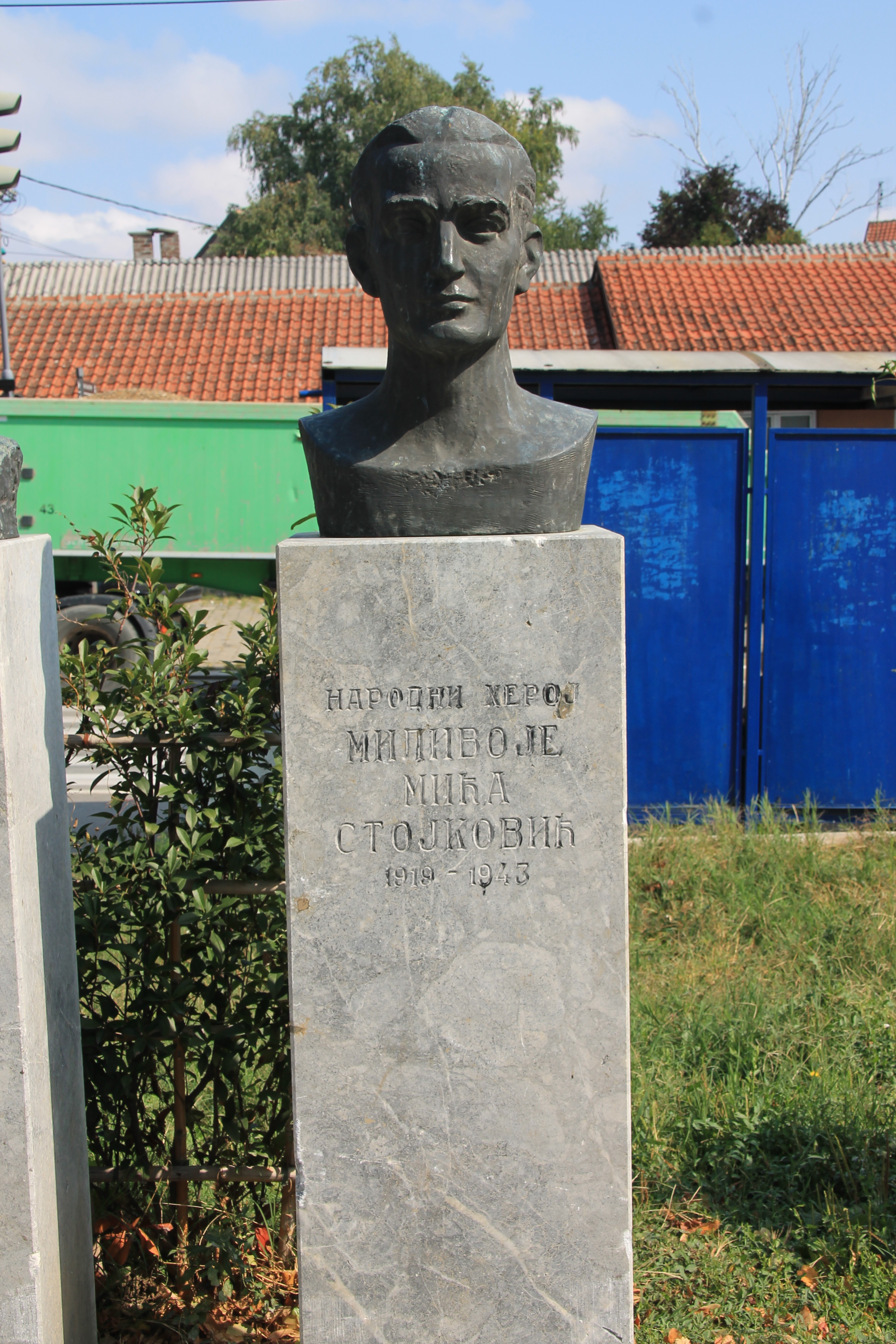 Monuments in Grocka